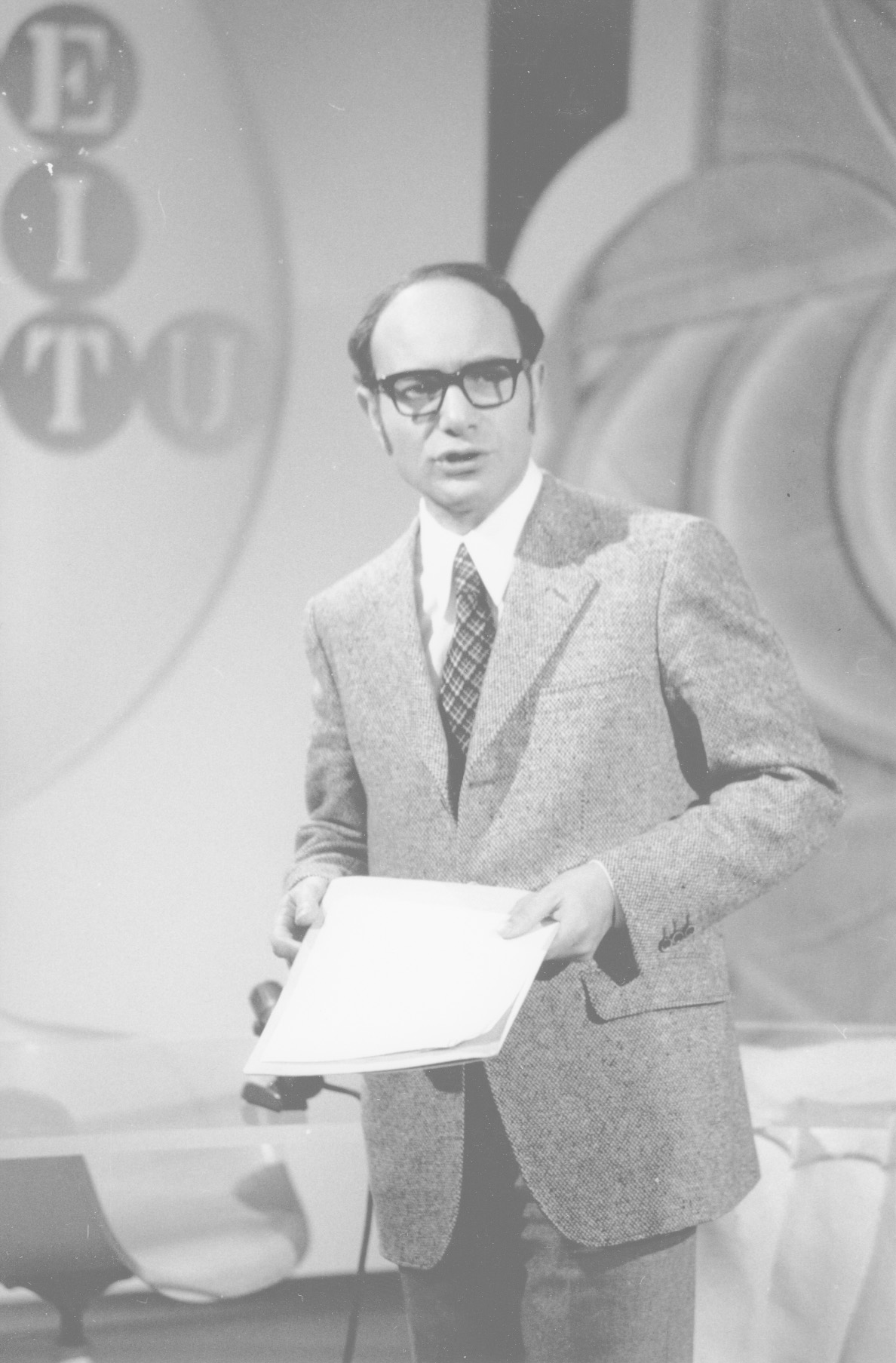 Roberto Bencivenga mentre presenta il programma A come Agricoltura.